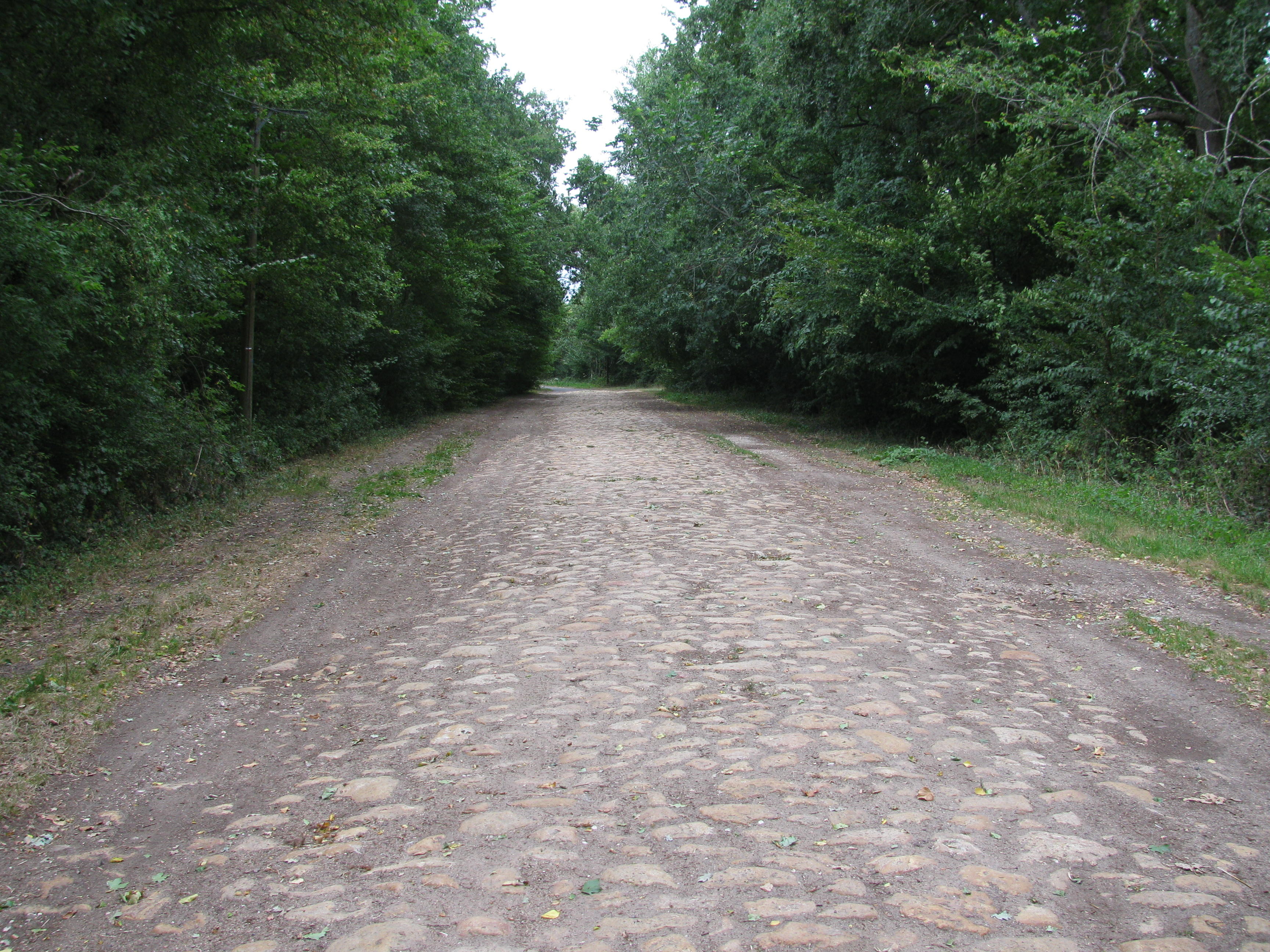 Vieille route impériale, ancienne voie romaine, portion pavée, au Nord de La Celle-sur-Loire.